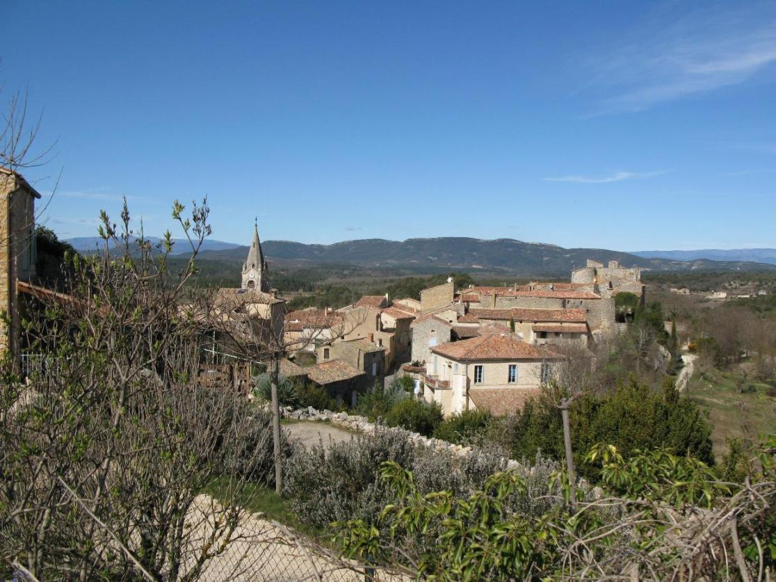 Village de La bastide de Virac (Ardèche)